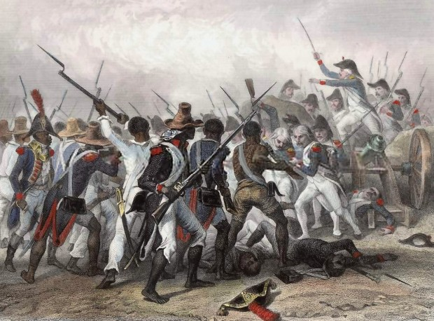 Battle of Vertières